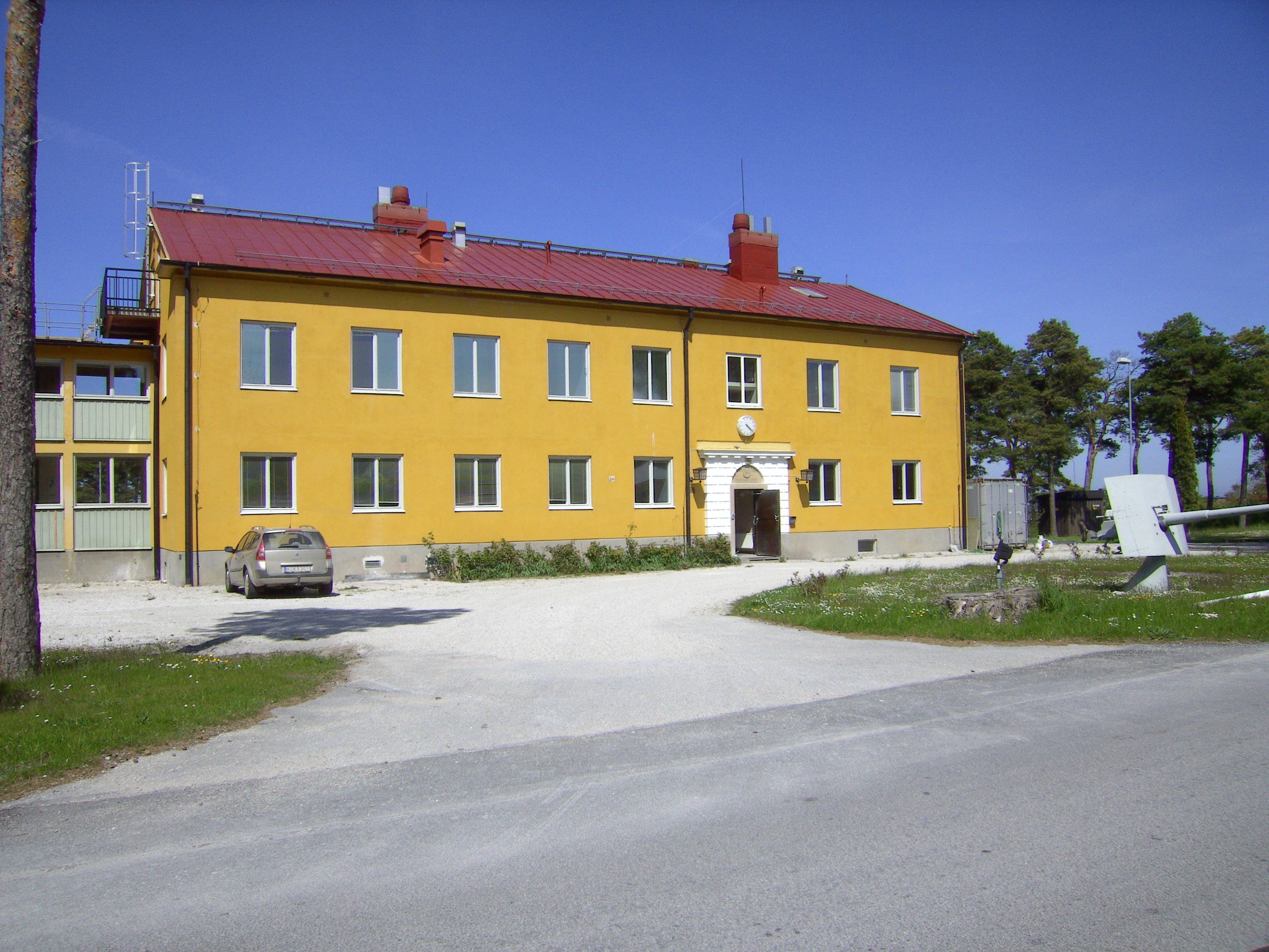 Kanslihuset vid KA 3.